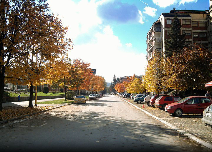 Ulica Alije Izetbegovića